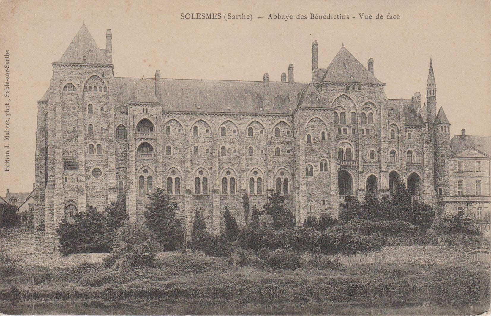 L'abbaye des bénédictins à Solesmes (Sarthe)